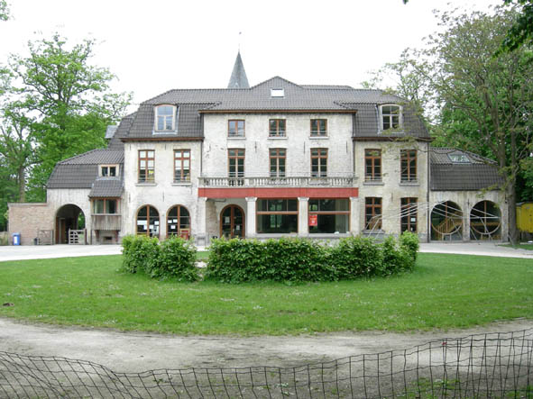 fabiolalaan 2_1